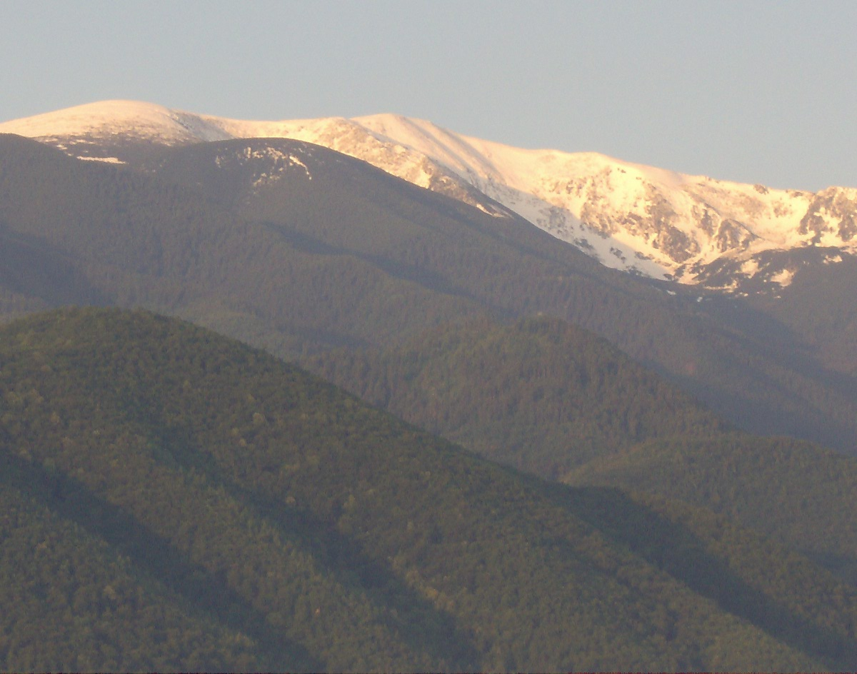 Peak Belmeken in the Rila mountain, Bulgaria.